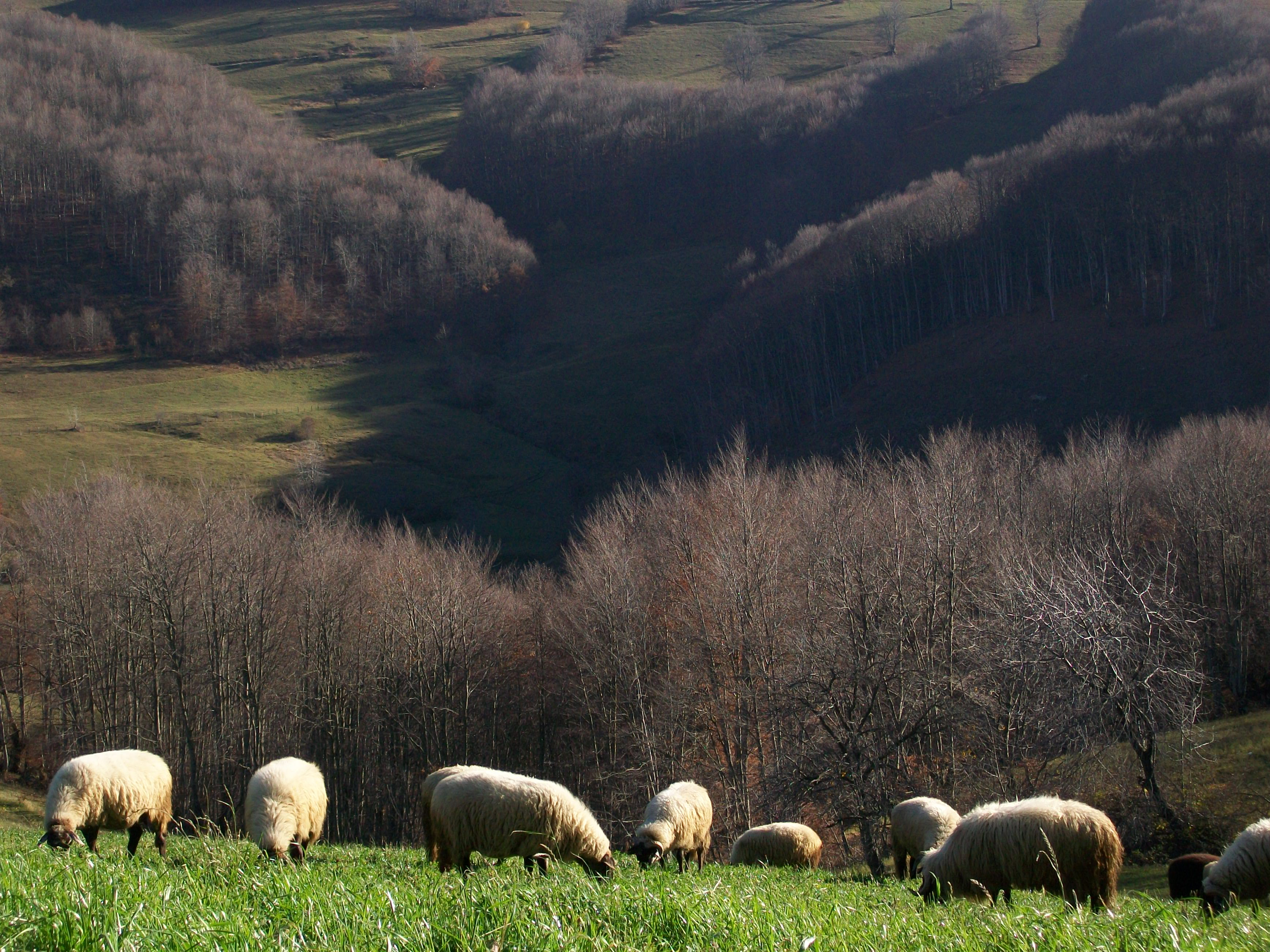 Një tjetër fotografi që shpreh begatitë tona si vend